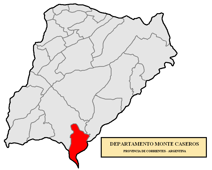 Localización del Departamento Monte Caseros en la provincia de Corrientes, Argentina Localización del Departamento Monte Caseros, en la provincia de Corrientes, Argentina.